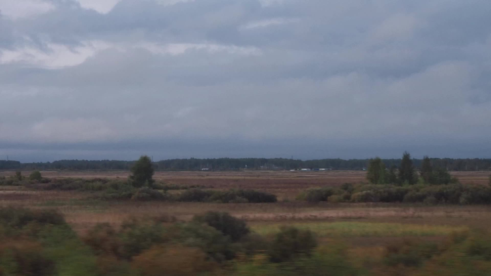 In Siberia